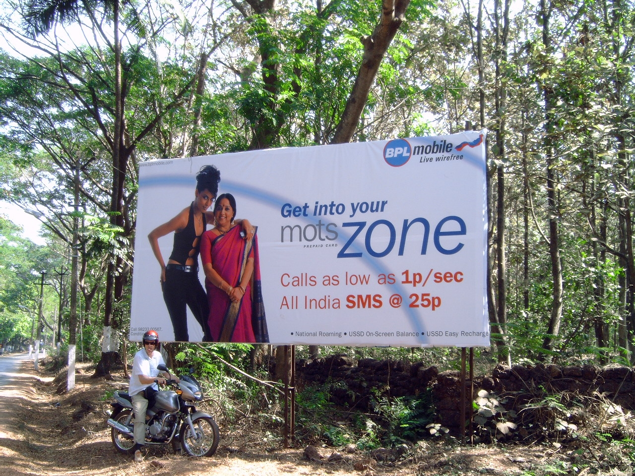 Eigen gemaakte foto in Goa India (2004)